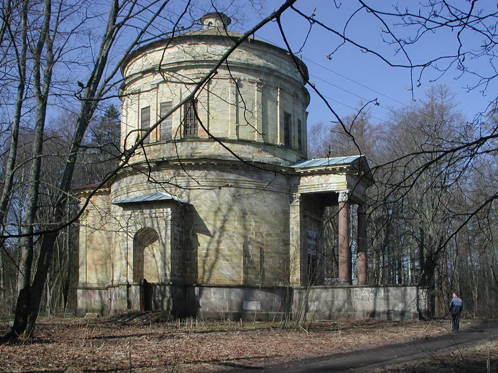 Каплица (Лен.область, Гатчинский р-н, посёлок Дружноселье)